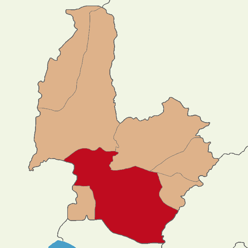 Osmaniye Merkez ilçesinin konumu